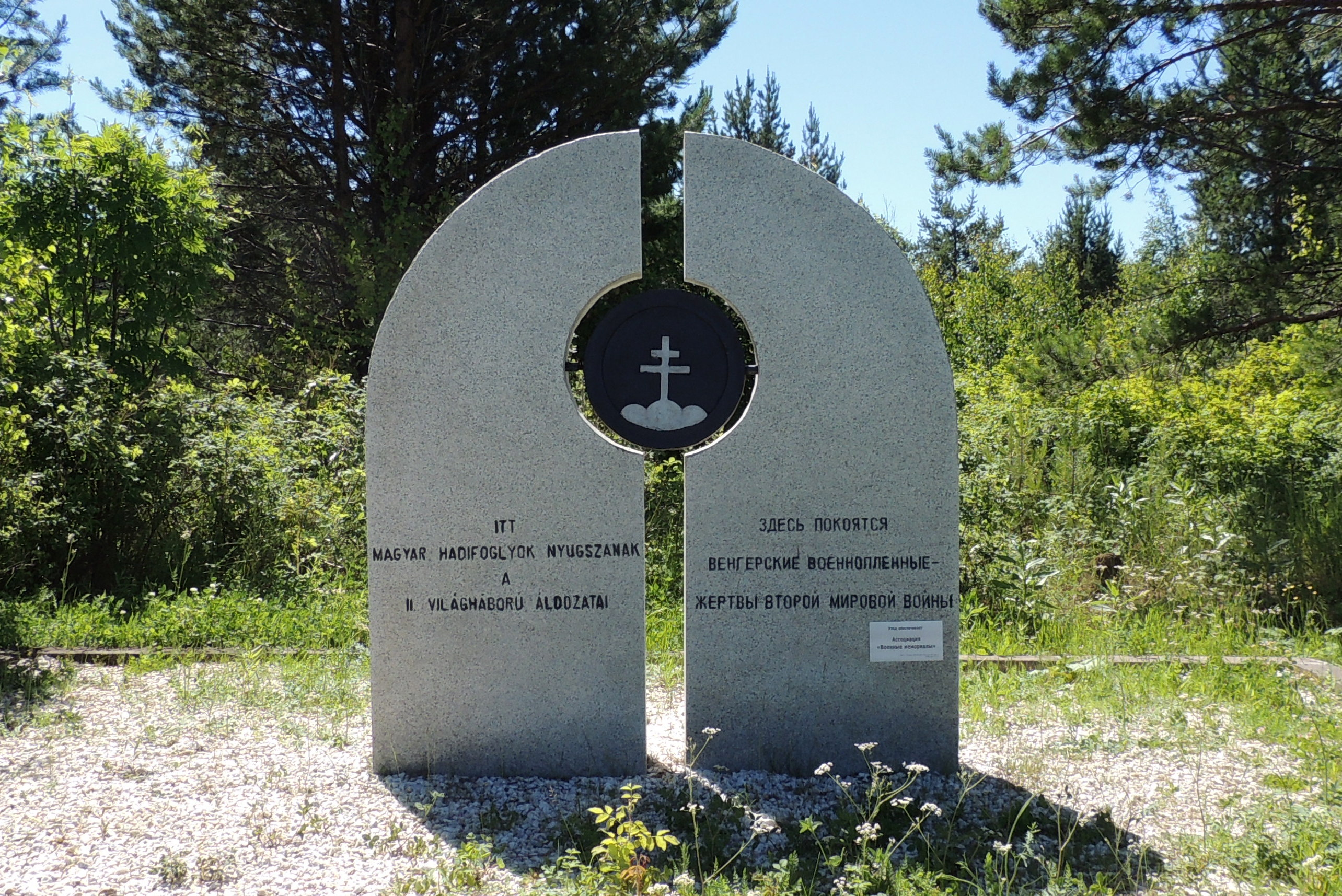 Памятный знак на месте захоронения венгерских военнопленных установлен в 1998 году в посёлке Туринка, город Карпинск